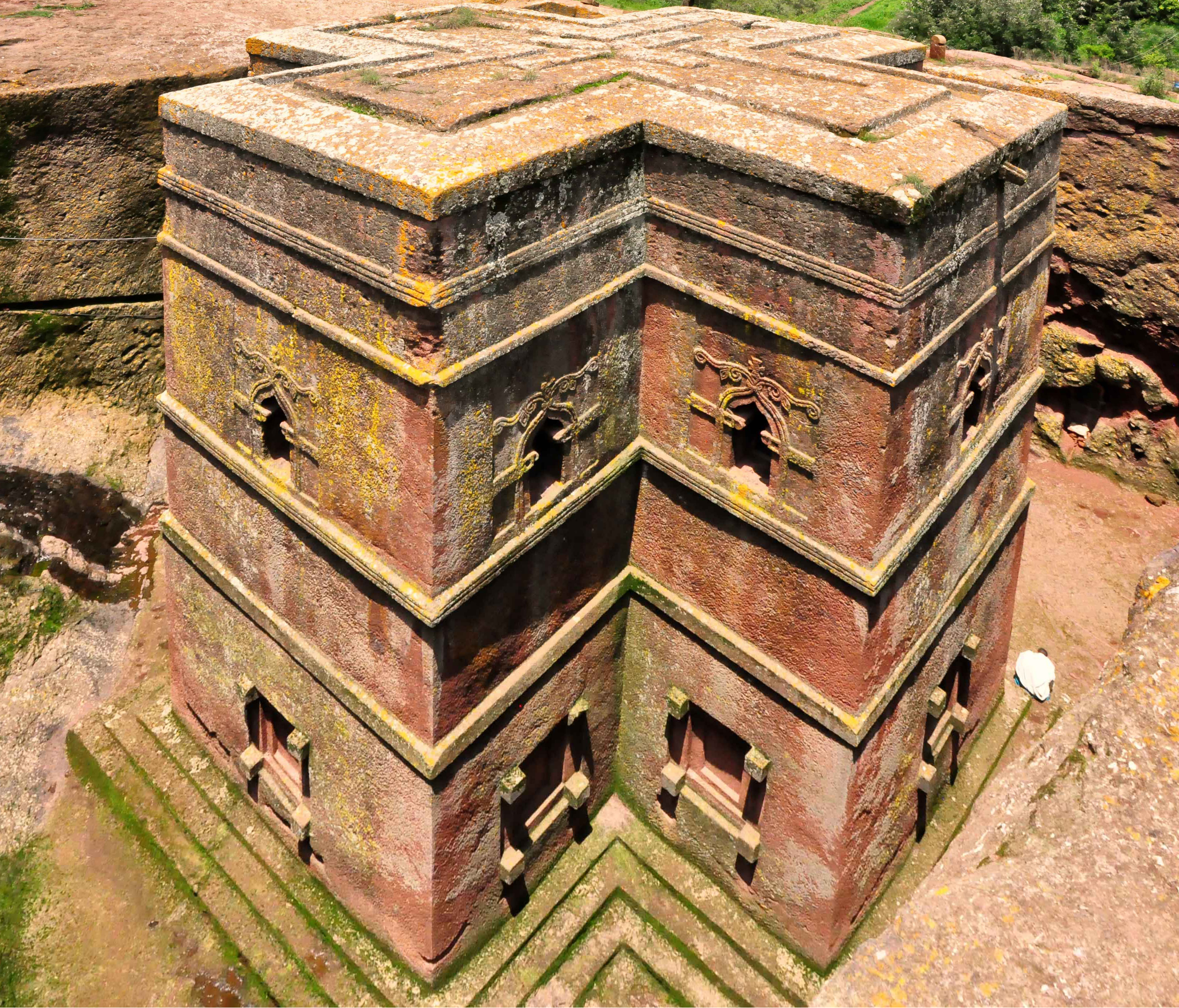 perspective redressée : église Saint-Georges, Lalibela